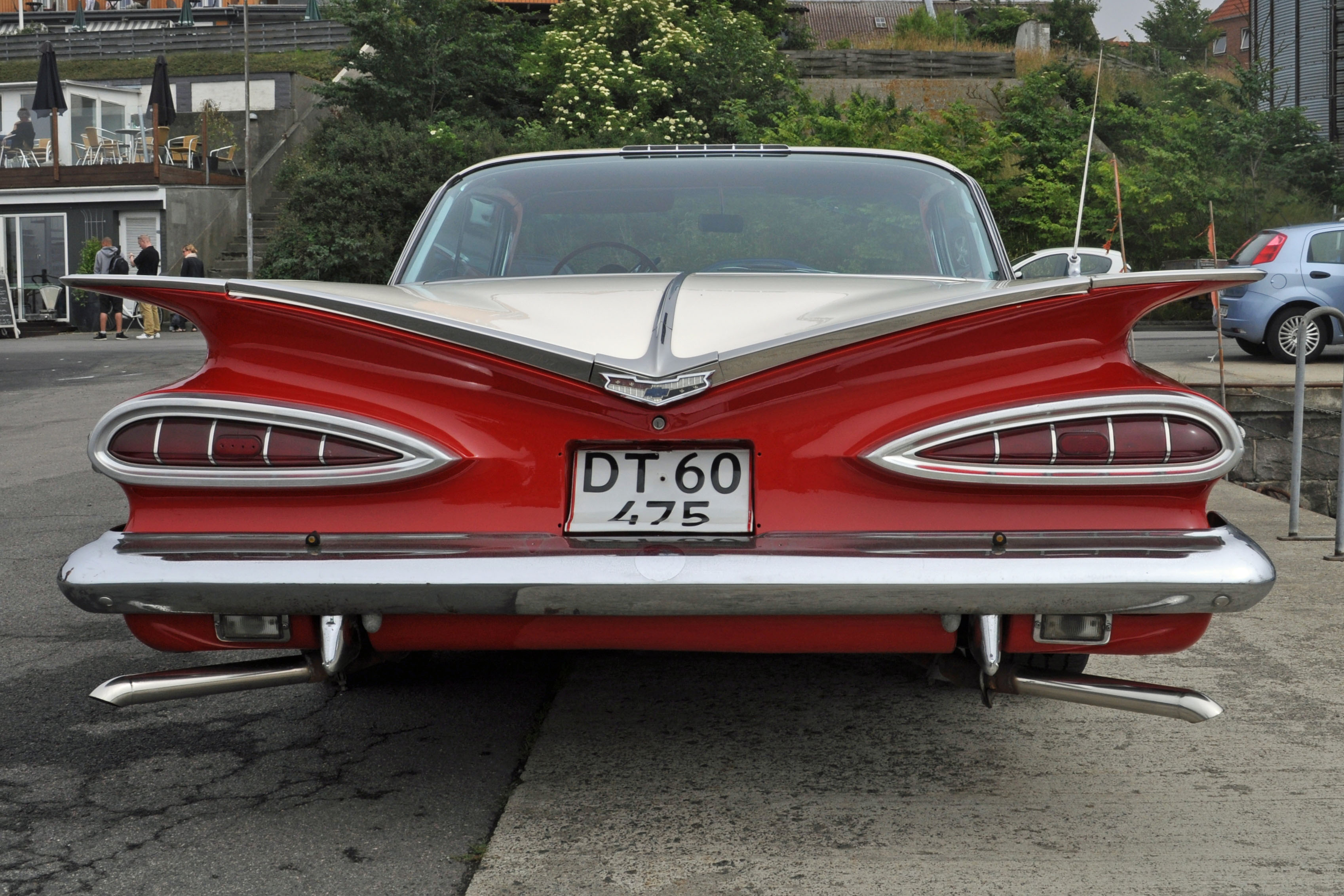 Chevrolet Impala, in Hasle, Bornholm (2012-07-08), by Klugschnacker in Wikipedia (3)